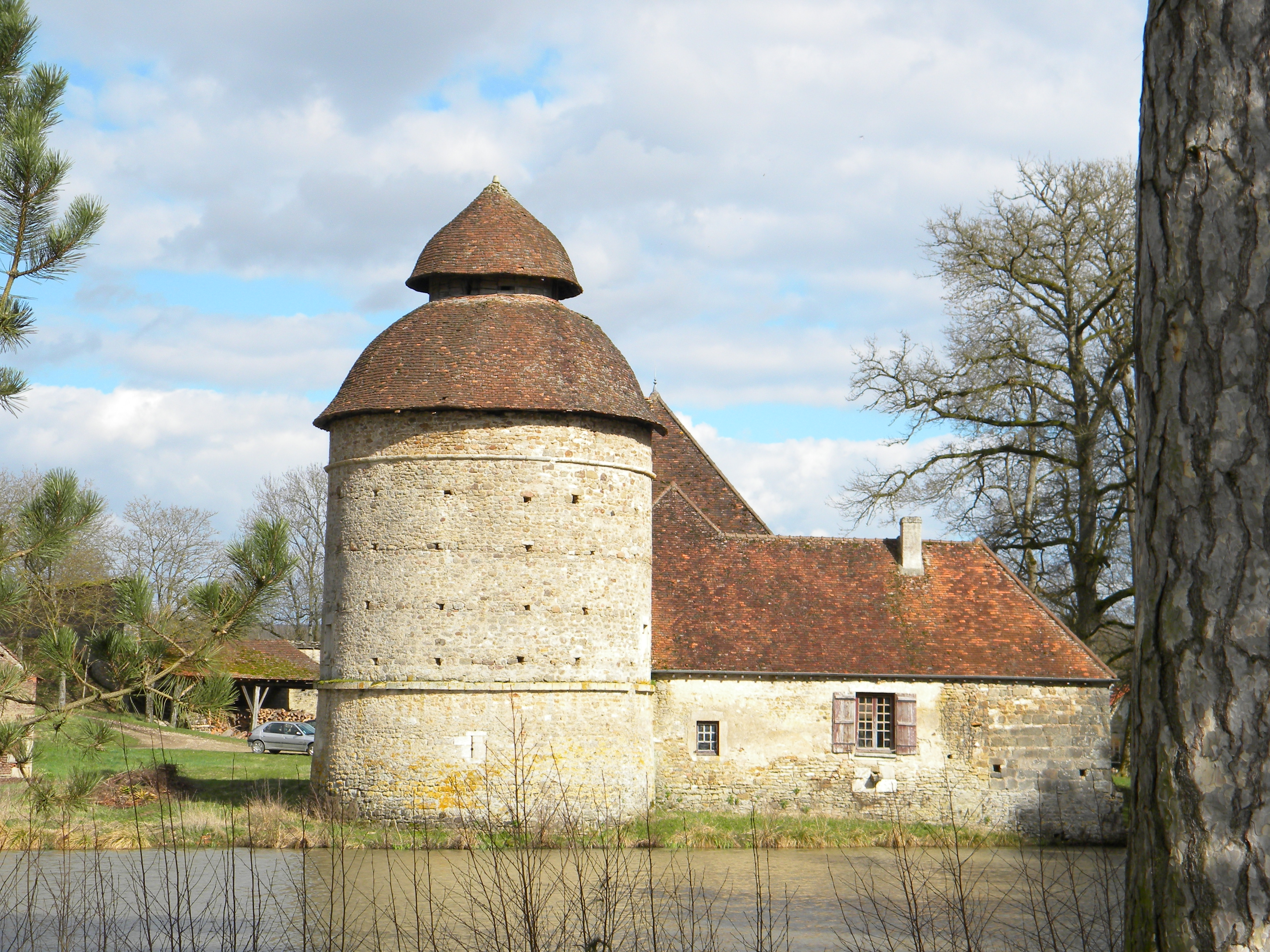 Tour du XIVème siècle